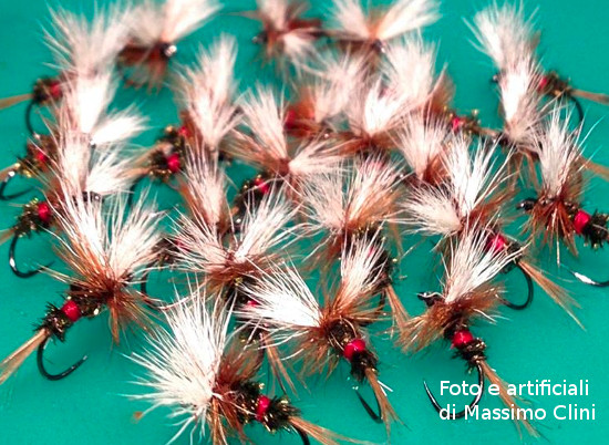 Imitazioni generiche di effimere su modello di Lee Wulff